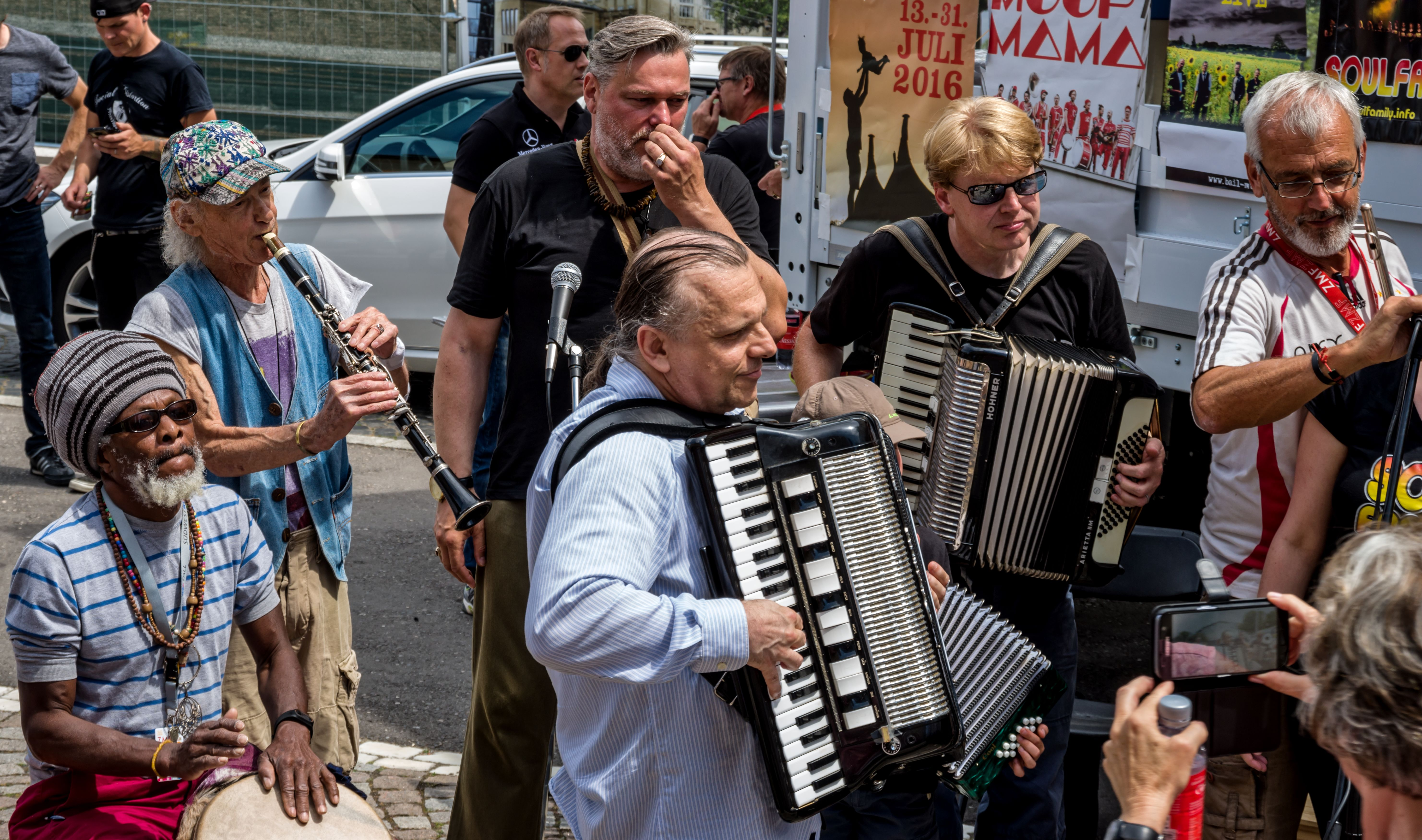 Bilder vom Zelt Musik Festival 2016 in Freiburg im Breisgau Zweite Stadtaktion am 23.07.2016 vor dem Theater